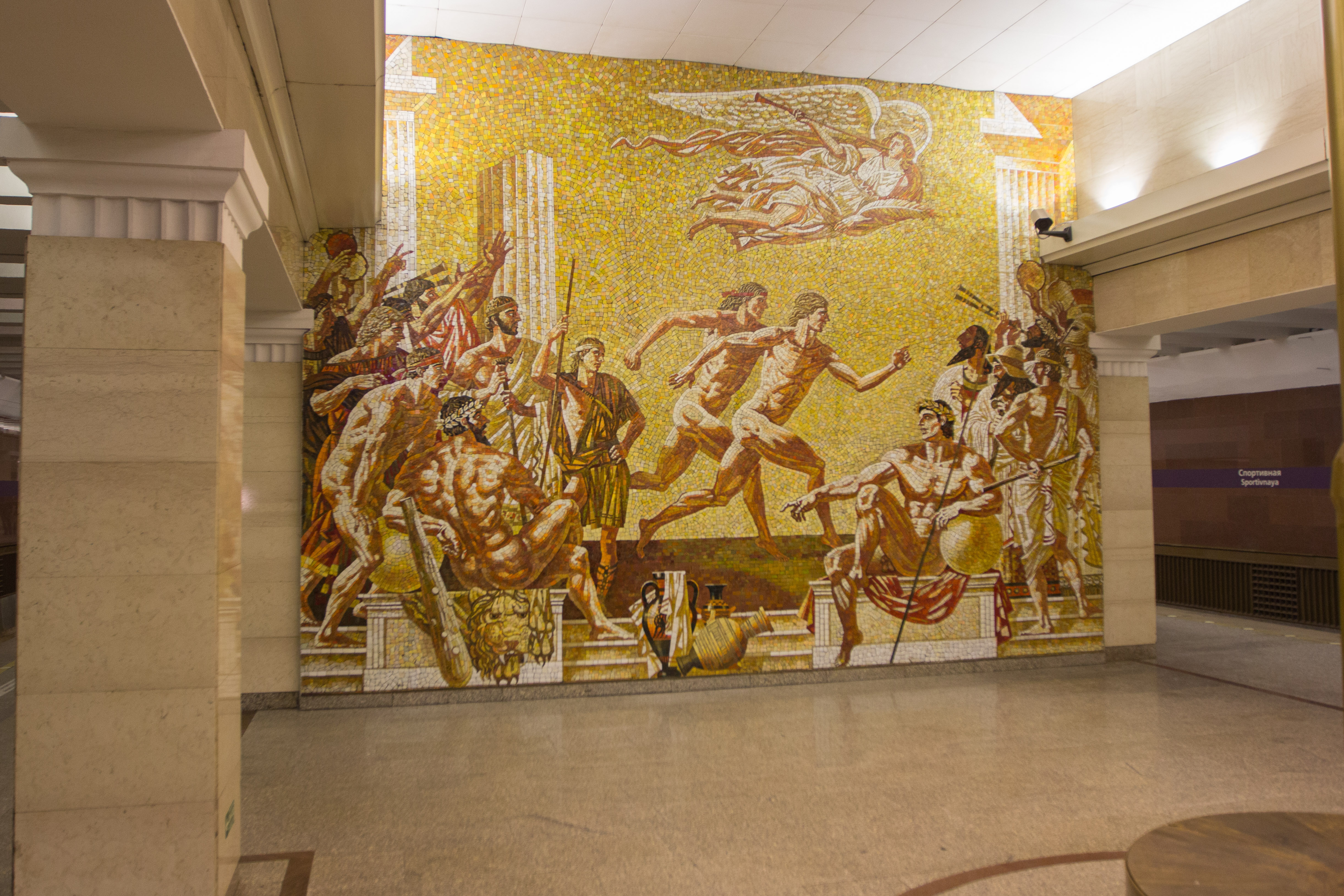 Vue de la station de métro Sportivnaya (Ligne 5) du métro de Saint-Pétersbourg (Russie)